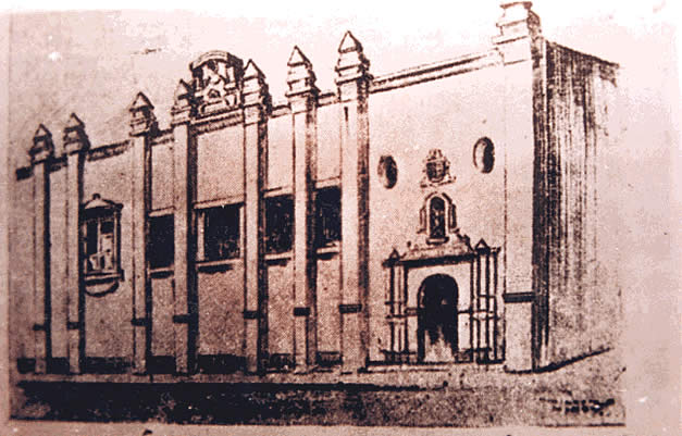 Fachada de antiguo local de la Real Universidad (ahora Universidad Nacional Mayor de San Marcos) en Lima, Perú.